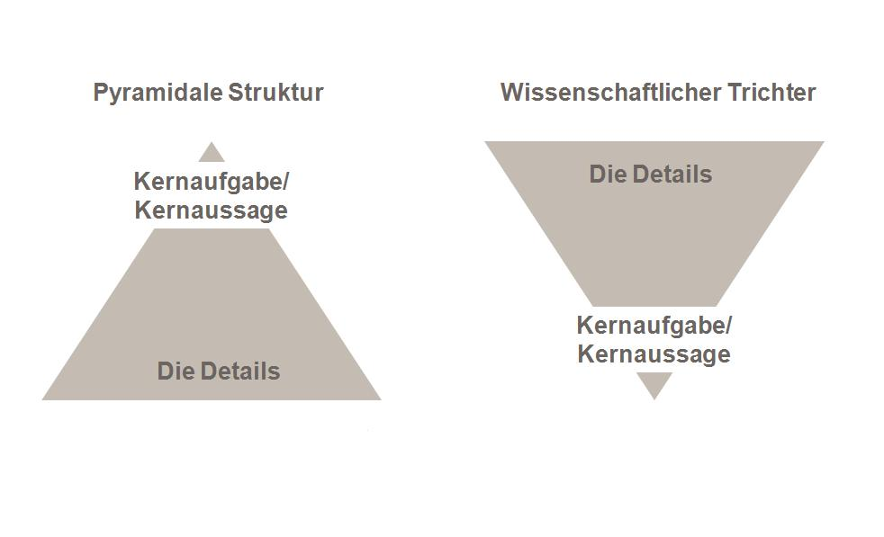 Pyramidales Prinzip vs. Wissenschaftlicher Trichter